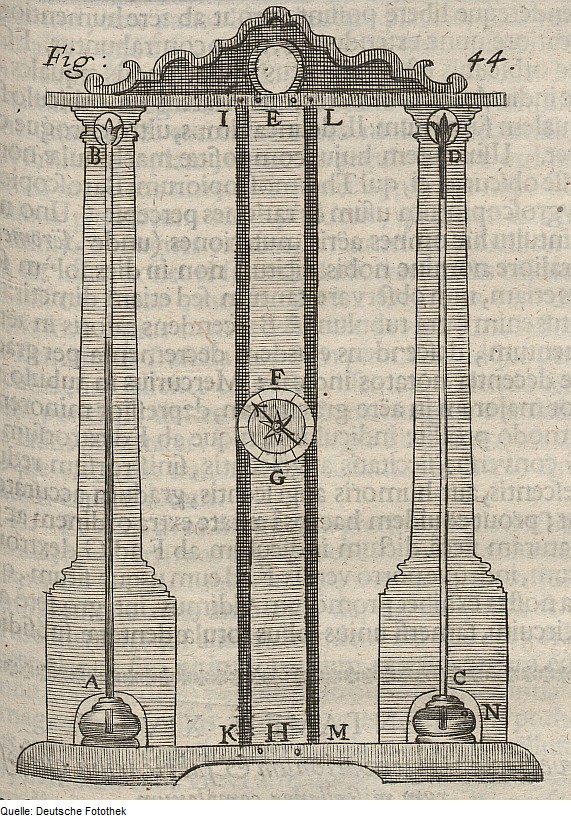 Original image description from the Deutsche Fotothek Physik & Dichte & Gas & Messinstrument